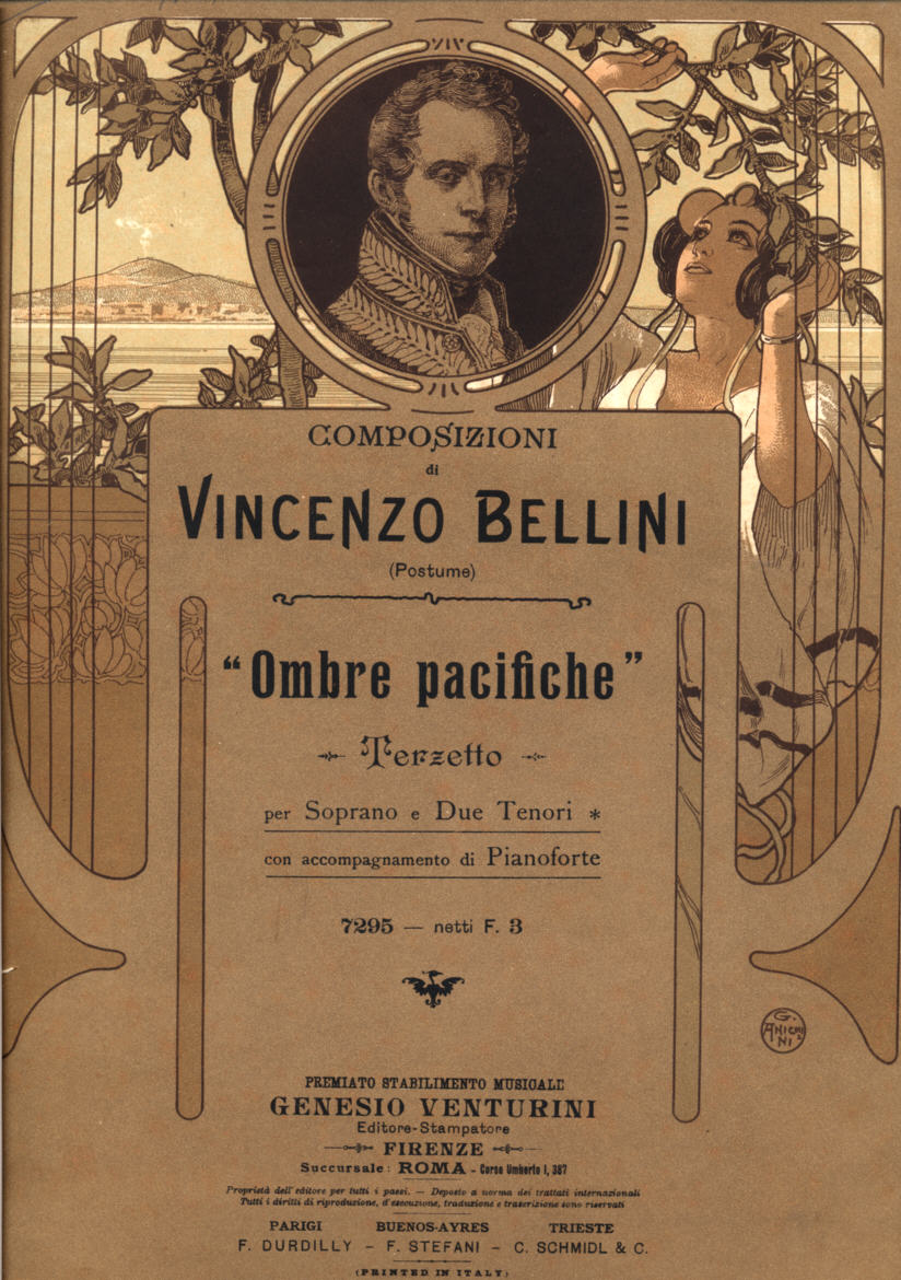 Riproduzione copertina di riduzione Ombre pacifiche, 1901